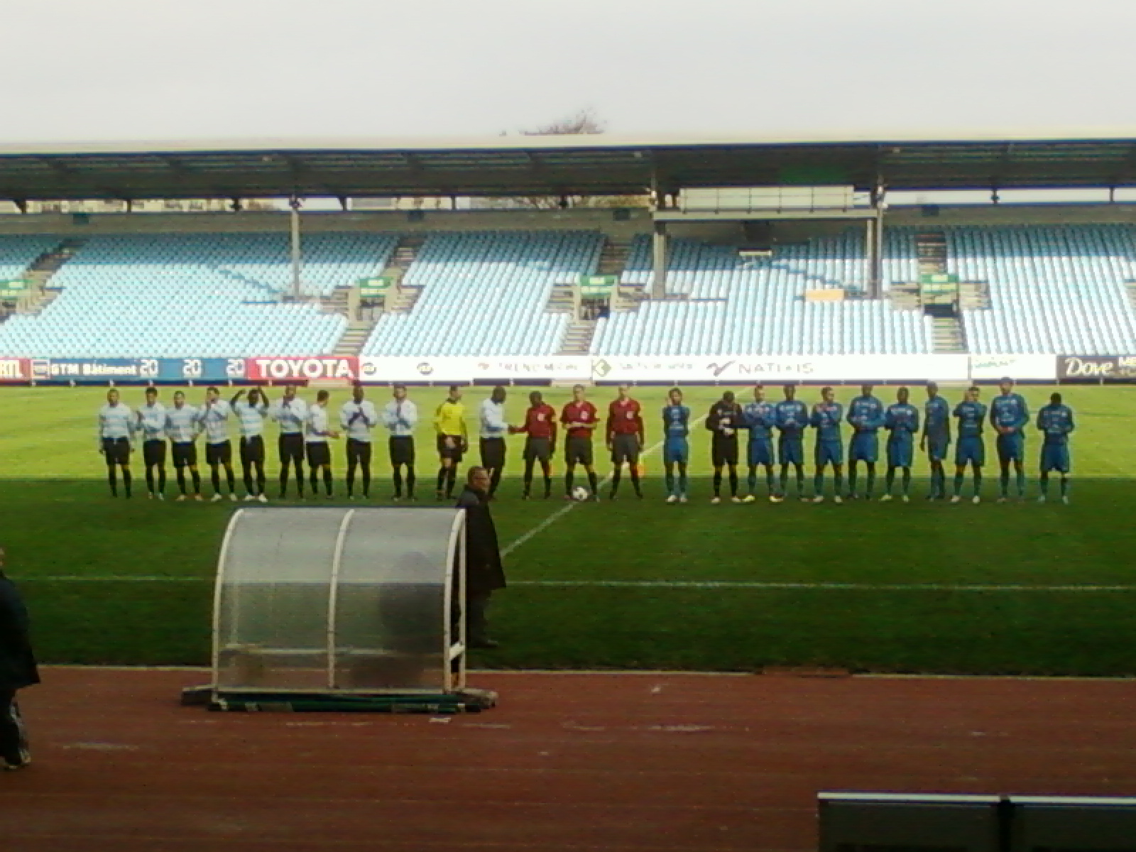 Présentation des équipes lors du match Racing CF 92 - US Créteil B du 06 novembre 2011 au stade Yves-du-Manoir (CFA 2)